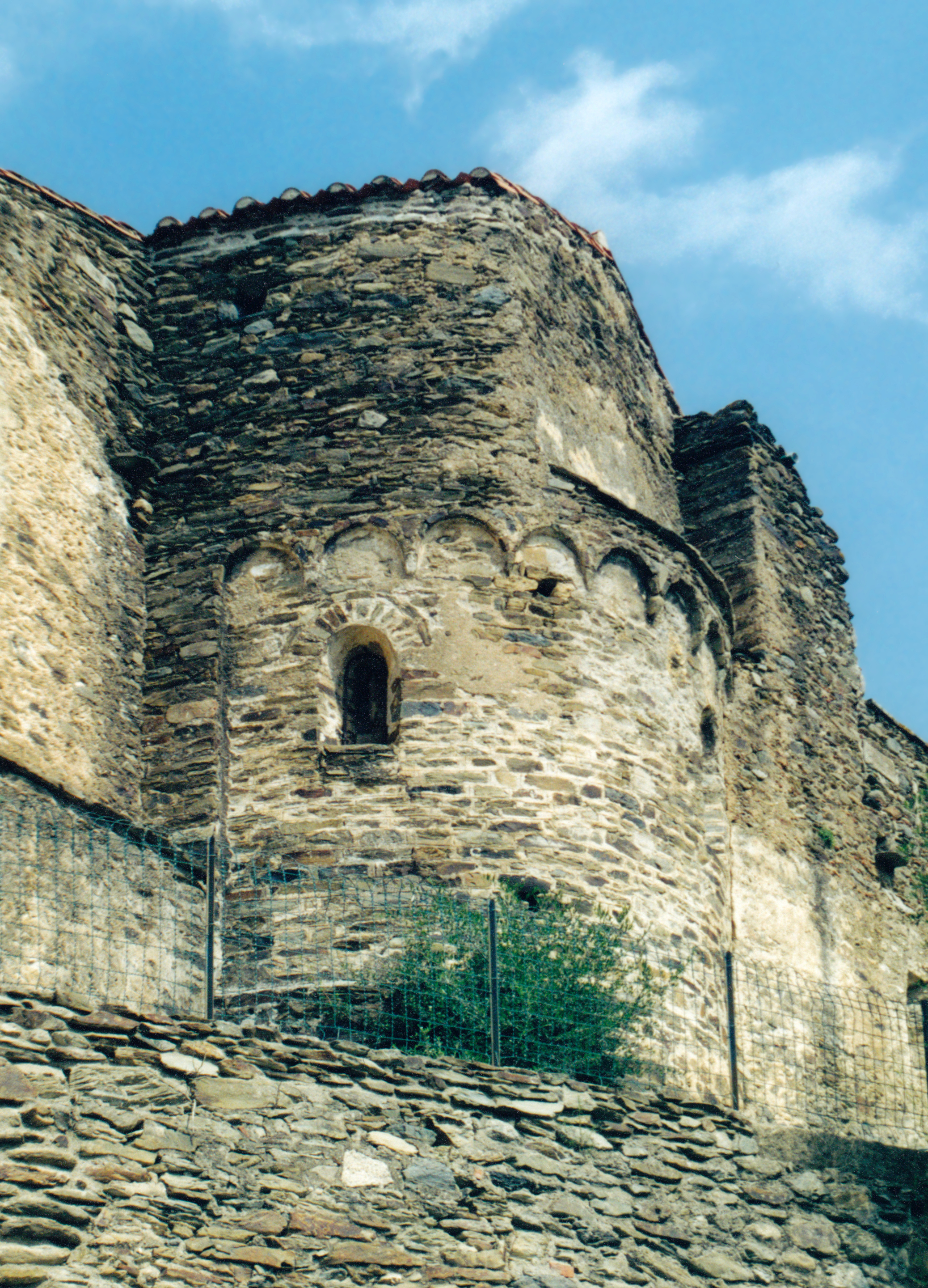 France - Pyrénées-Orientales - Église de Saint-Michel-de-Llotes